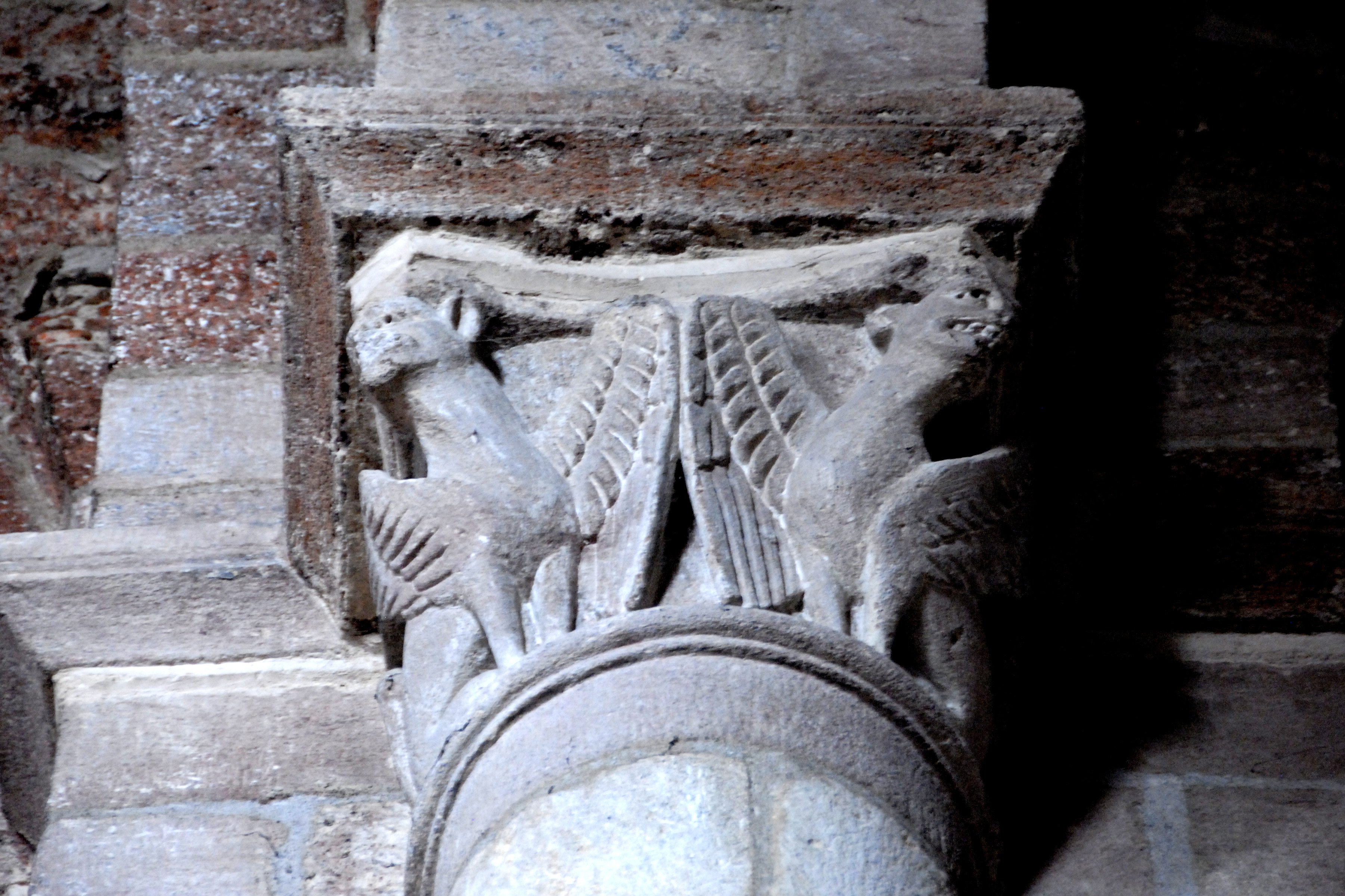 St.-Julien Brioude, Kapitell, geflügelte Drachen